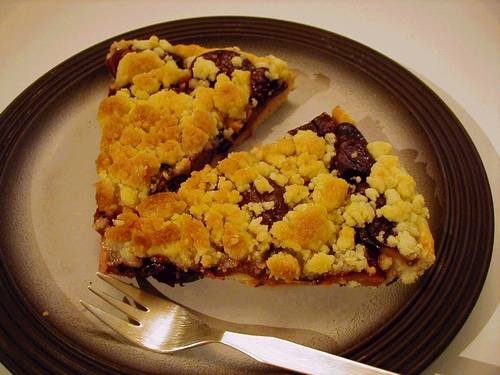 Streuselkuchen with plums